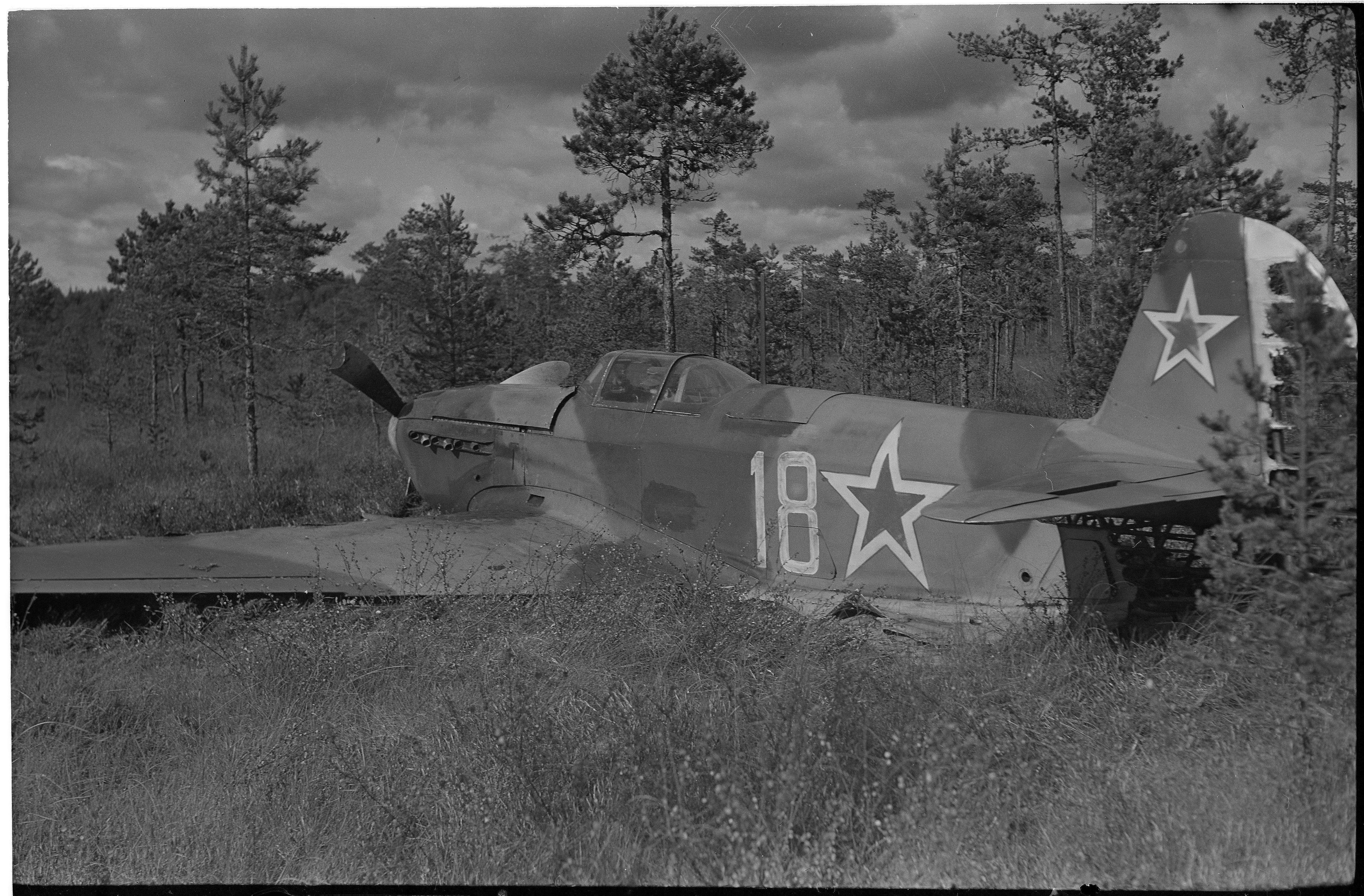 Pakkolaskun tehnyt venäläinen lentokone. Kone on uutta ``JaK´´ tyyppiä, joka ei ole aikaisemmin rintamilla esiintynyt. (Kuvassa on Jakovlev Jak-9) Kuvauspaikka: Pulsa-Vihosinkylän välinen maasto